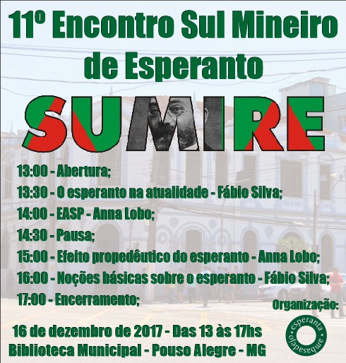 Bildo pri la renkontiĝo kiu okazos en la venonta monato en Poŭzalegro - Minas-Ĝerajso.